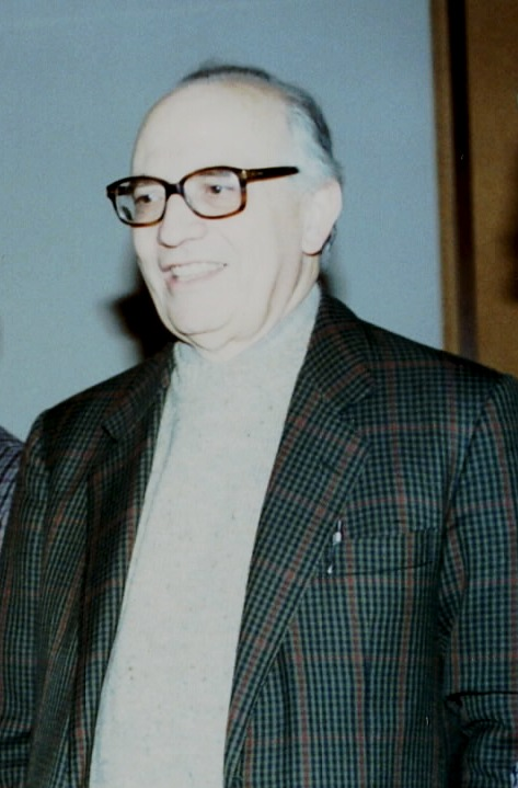 Foto di Mario Fondelli durante la discussione di una tesi della Scuola di Topografia Applicata scattata il 28.04.1995 alla Facoltà di Ingegneria dell'Università degli Studi di Firenze